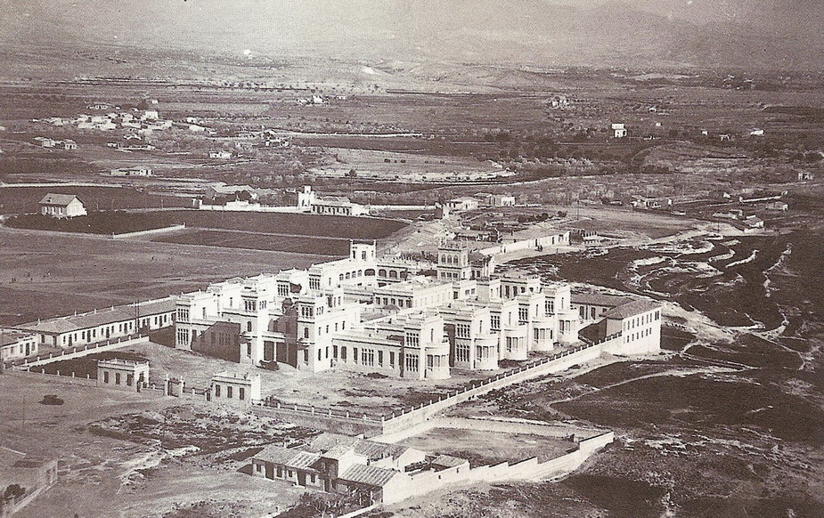 MARQ